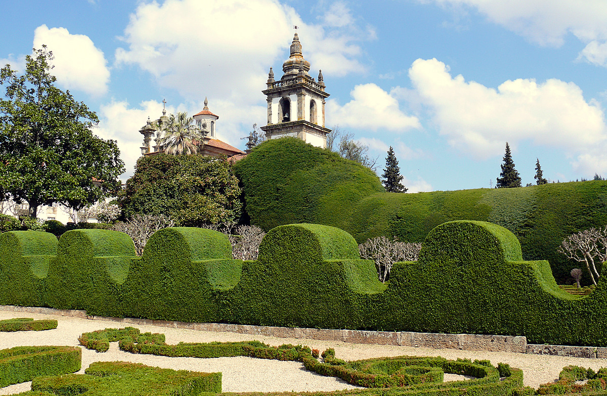 jardim do Solar de Mateus This file was uploaded for Wiki Loves Monuments in Portugal with the unique identifier 71128.